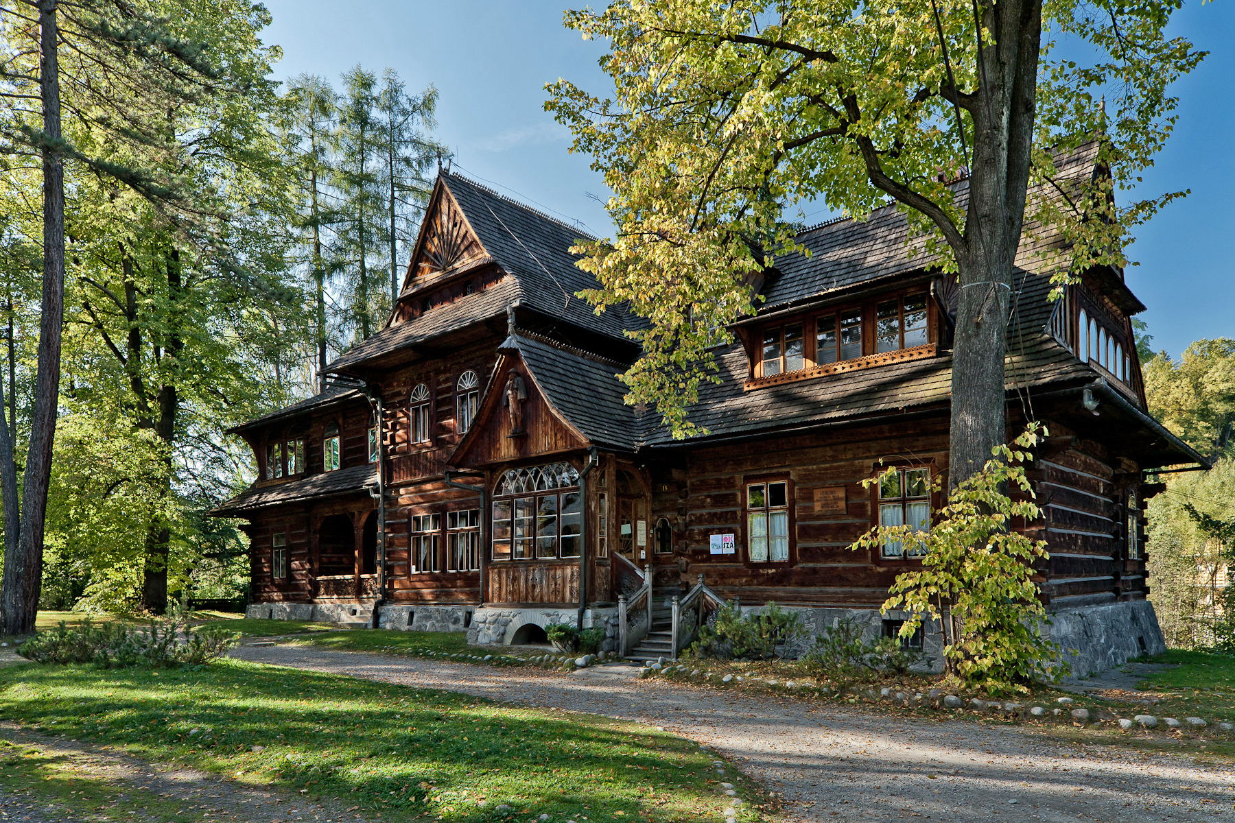 Willa drewn. „Koliba”, Zakopane